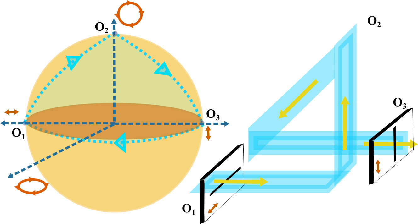 போன்கரேக் கோளத்தில் குறுக்கீட்டுவிளைவு